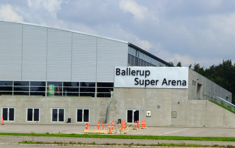 Ballerup Super Arena